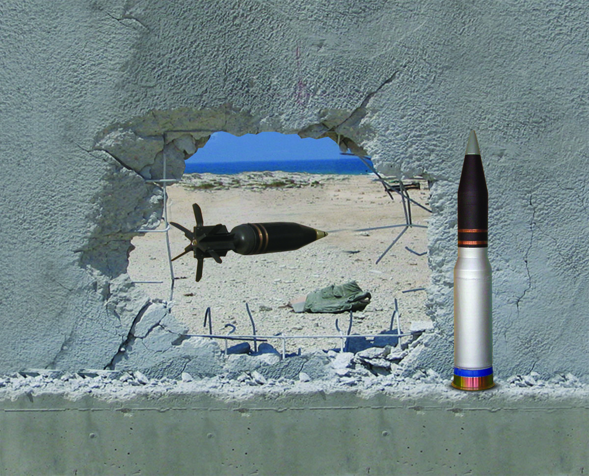 פגז טנקים כלנית